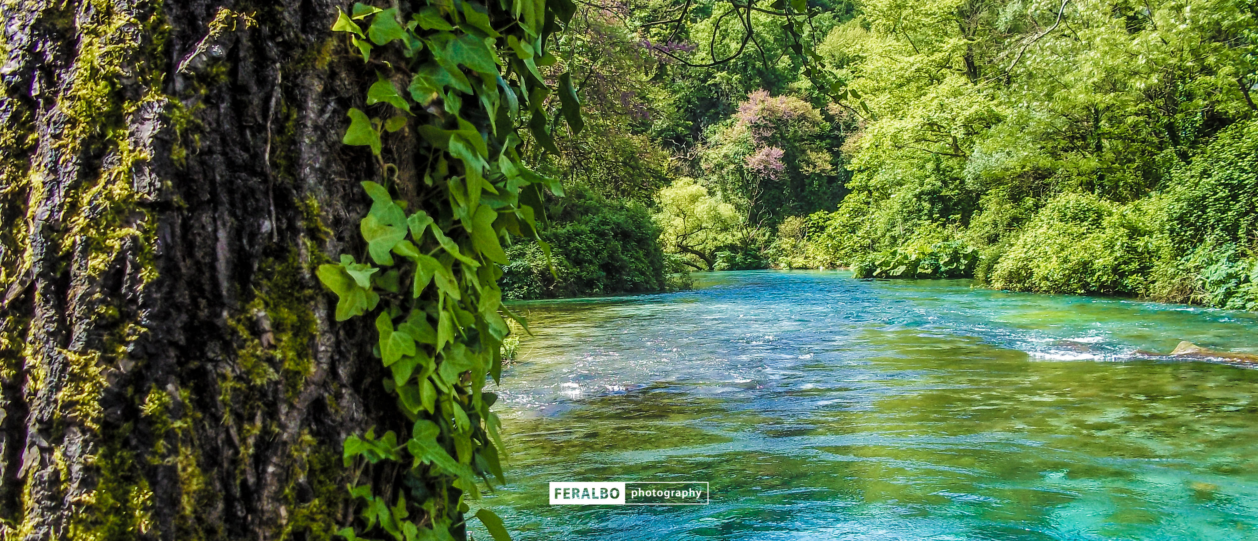 Panoramë e Syrit të Kaltër